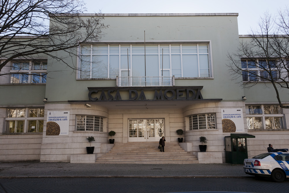 Casa da Moeda, Lisboa; Arq. Jorge Segurado